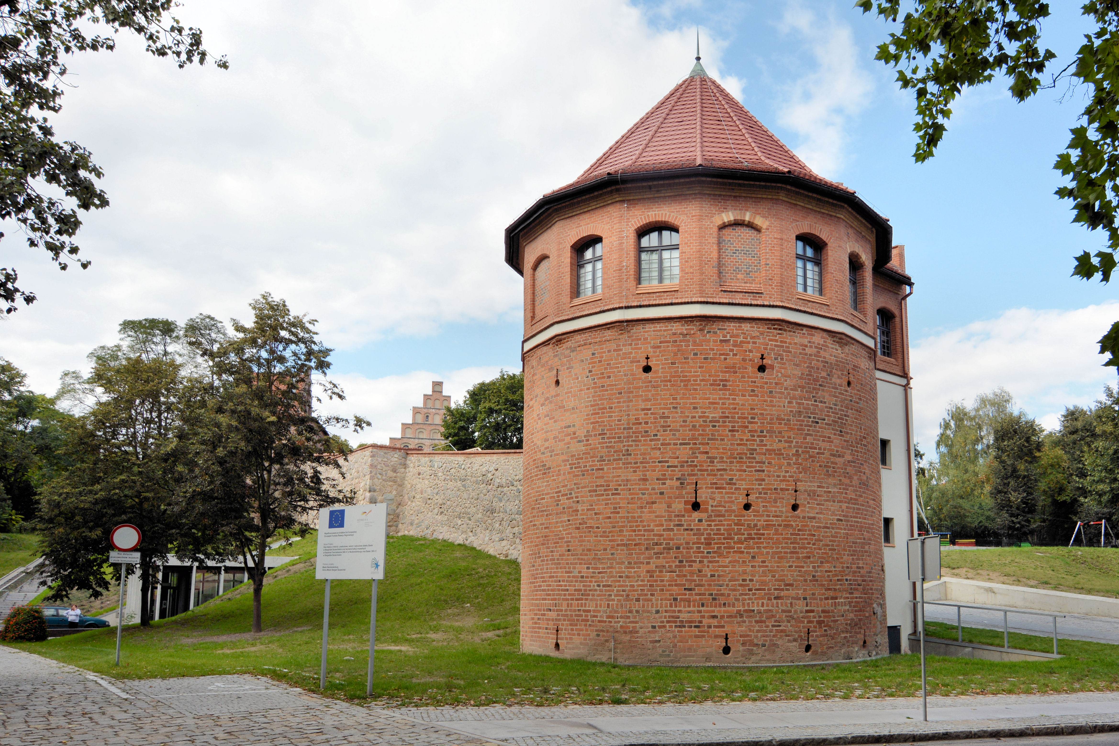 Stargard Szczeciński, mury obronne, XIII/XIV, XV, basteja